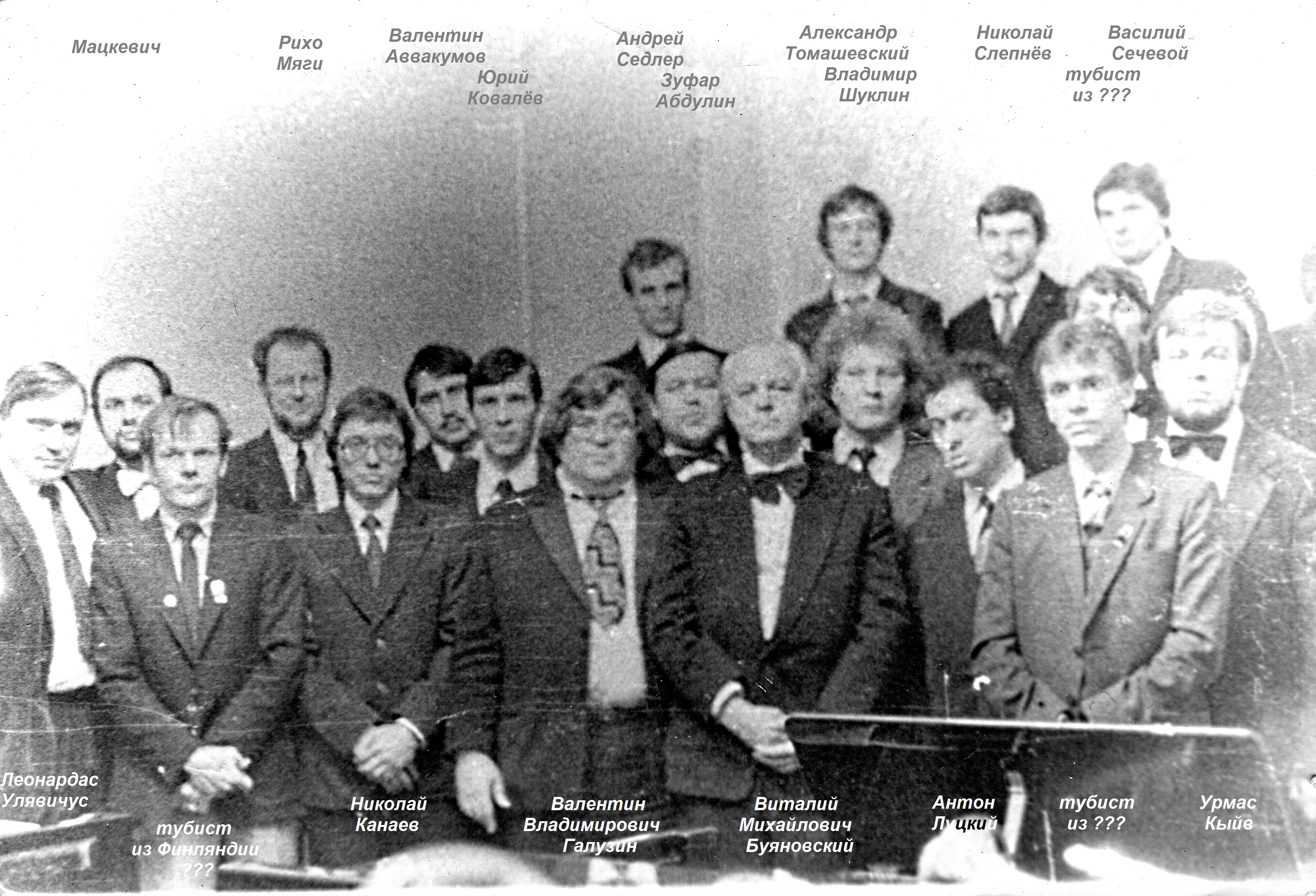 1985, Ленгосконсерватория, В.В.Галузин с учениками (и пригл. тубистами) после концерта класса и В.М.Буяновский